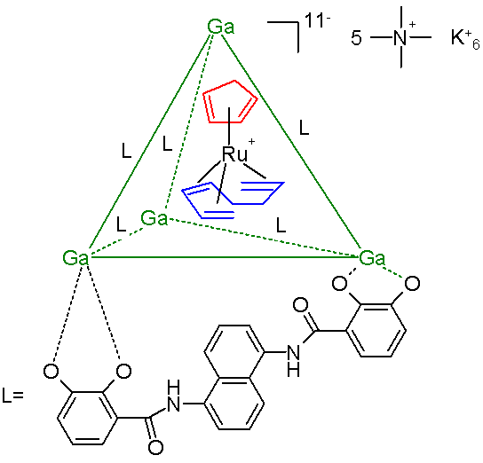 Container molecule GA cluster